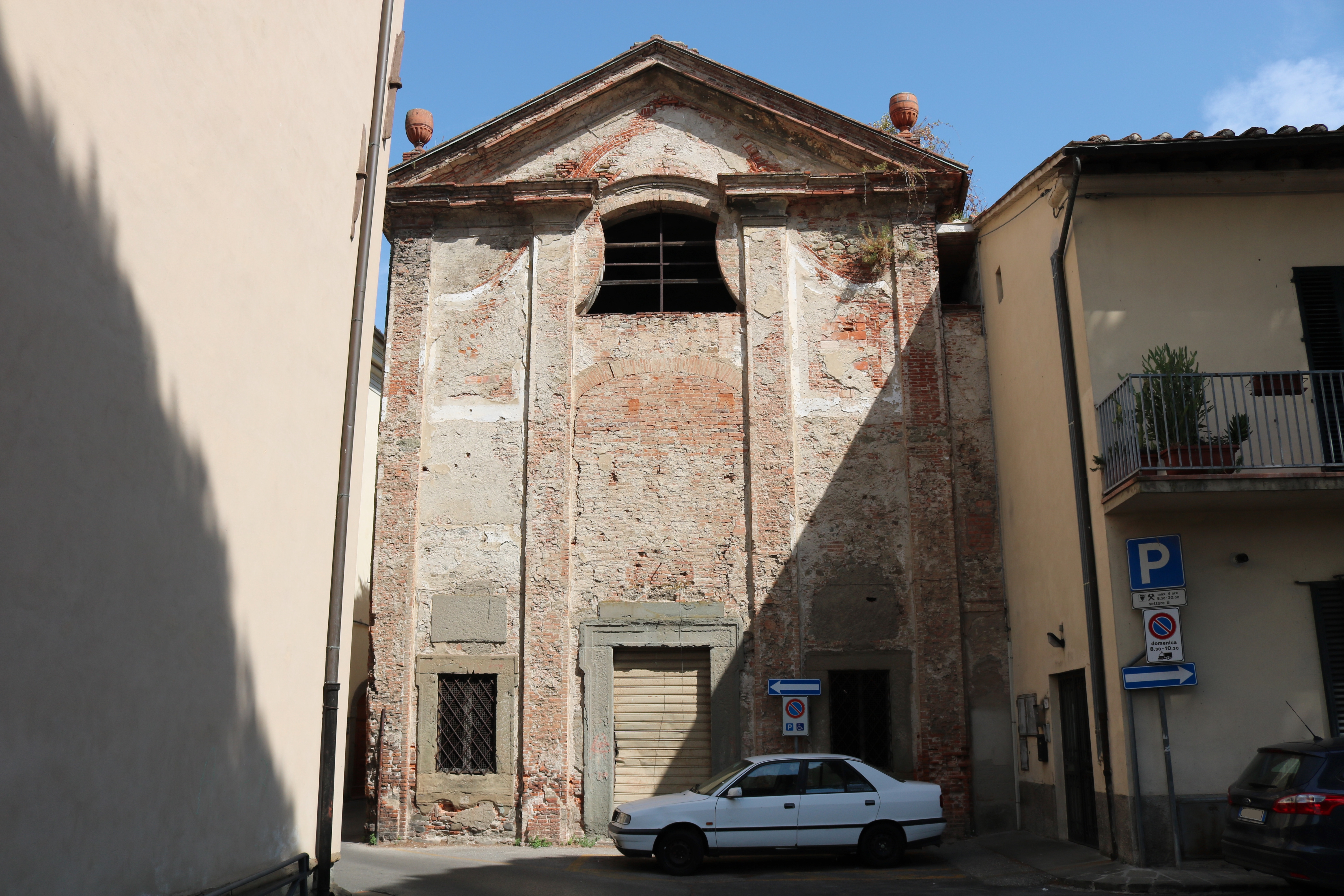 Oratorio di Sant’Ansano, Pistoia